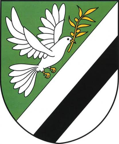 Věstín, znak obce